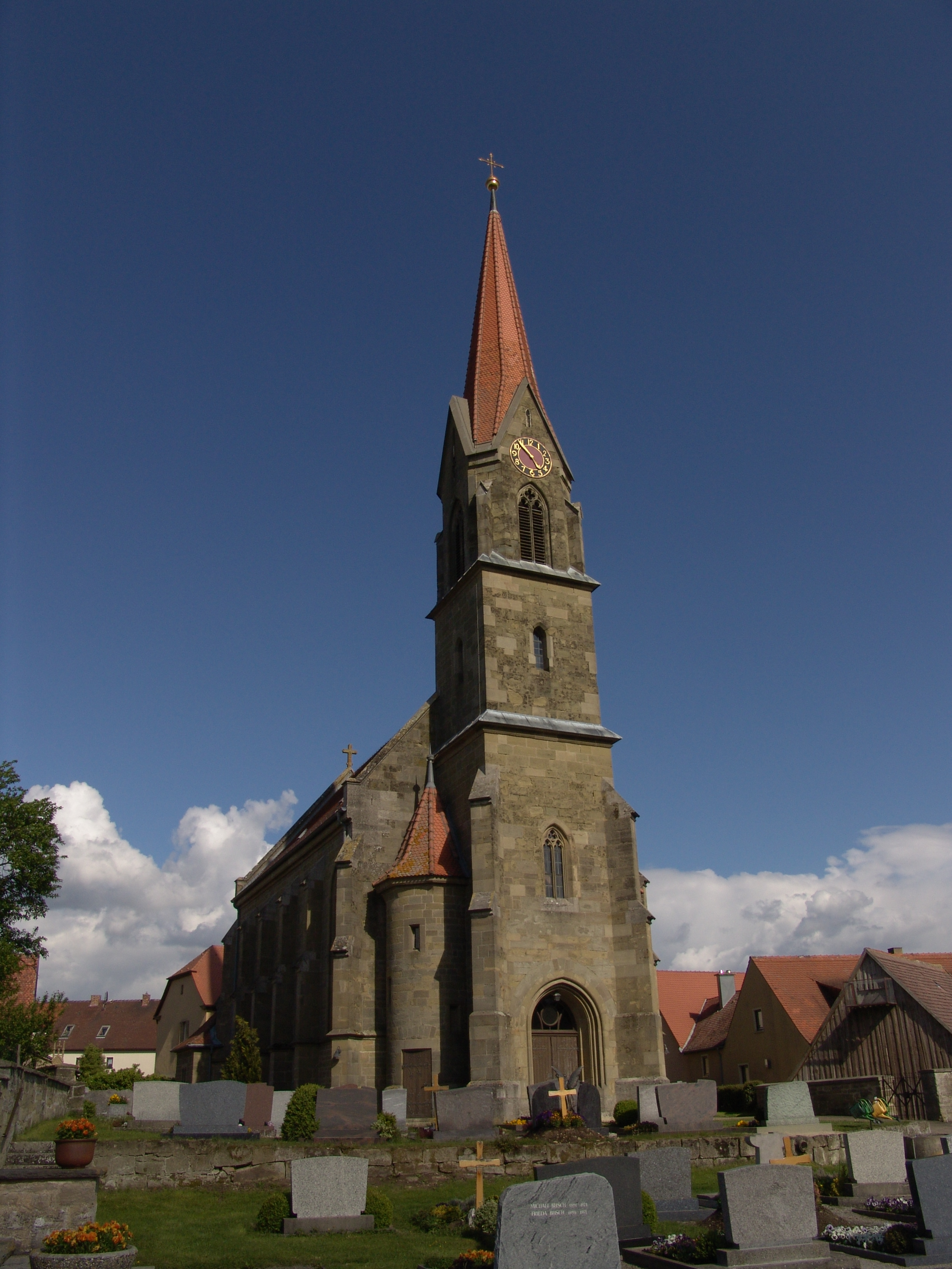 evang.-luth Kirche St. Bartholomäus in Diebach